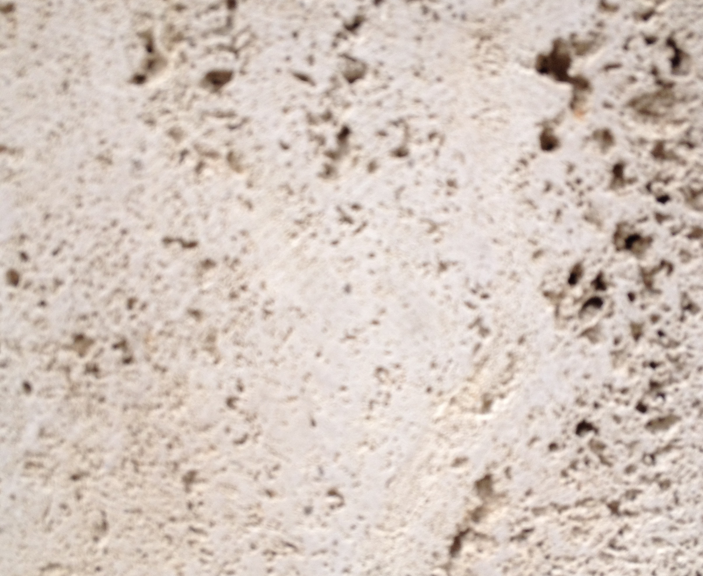 Bärenthaler Kalktuff. Muster ca. 12 x 12 cm